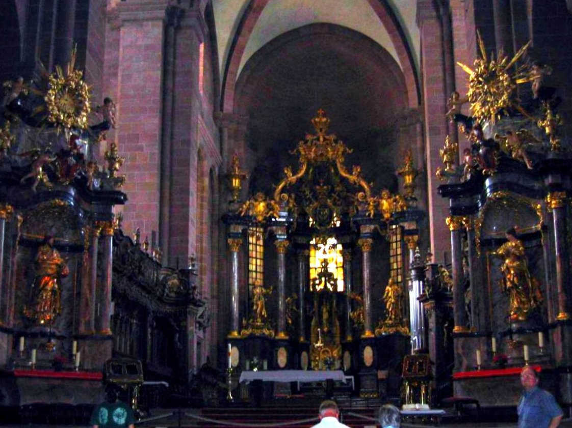 Собор св. Петра в Вормсе (интерьер)